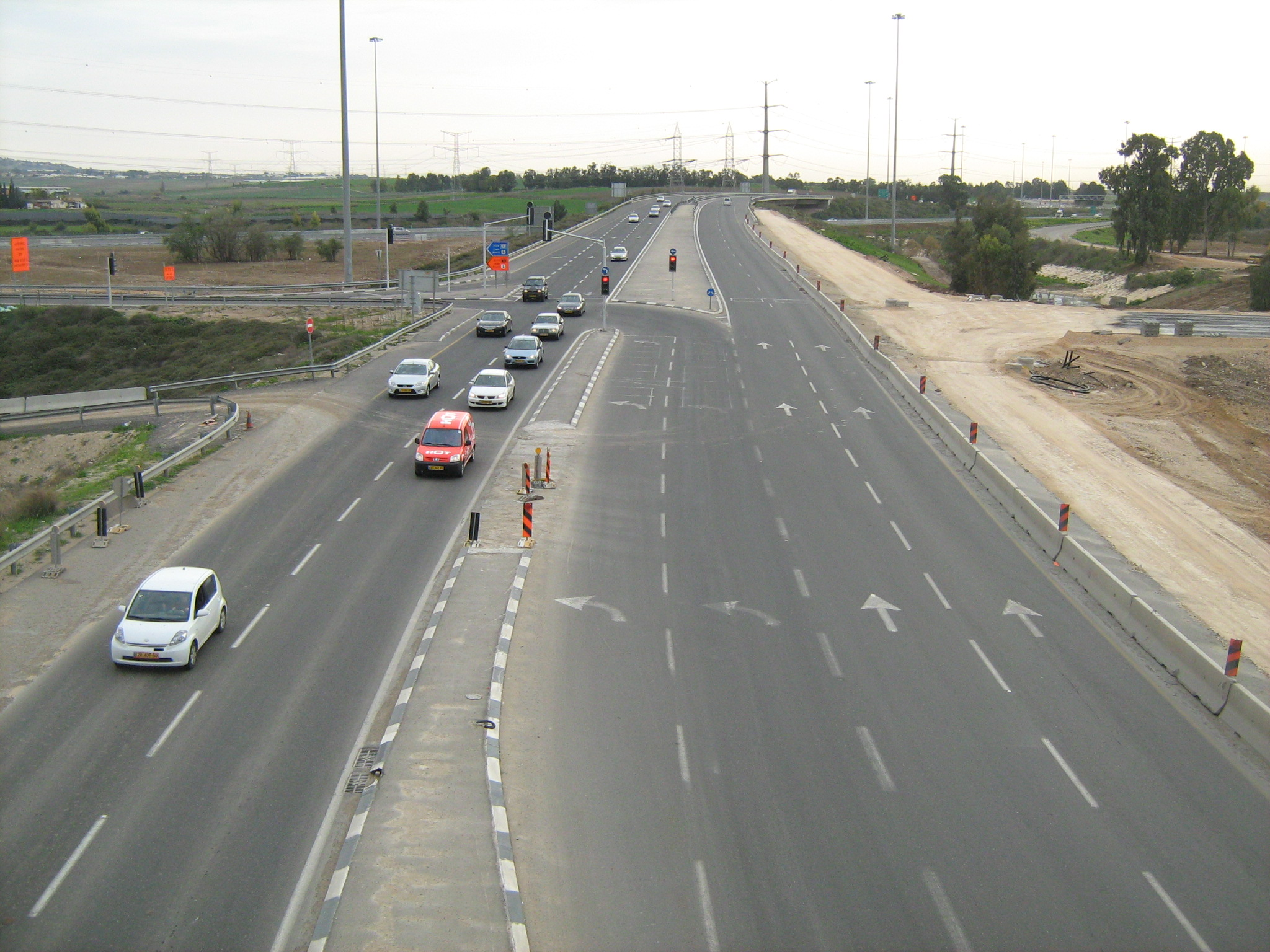 מחלף נשרים - מבט דרומה מכביש 431 לכביש 44